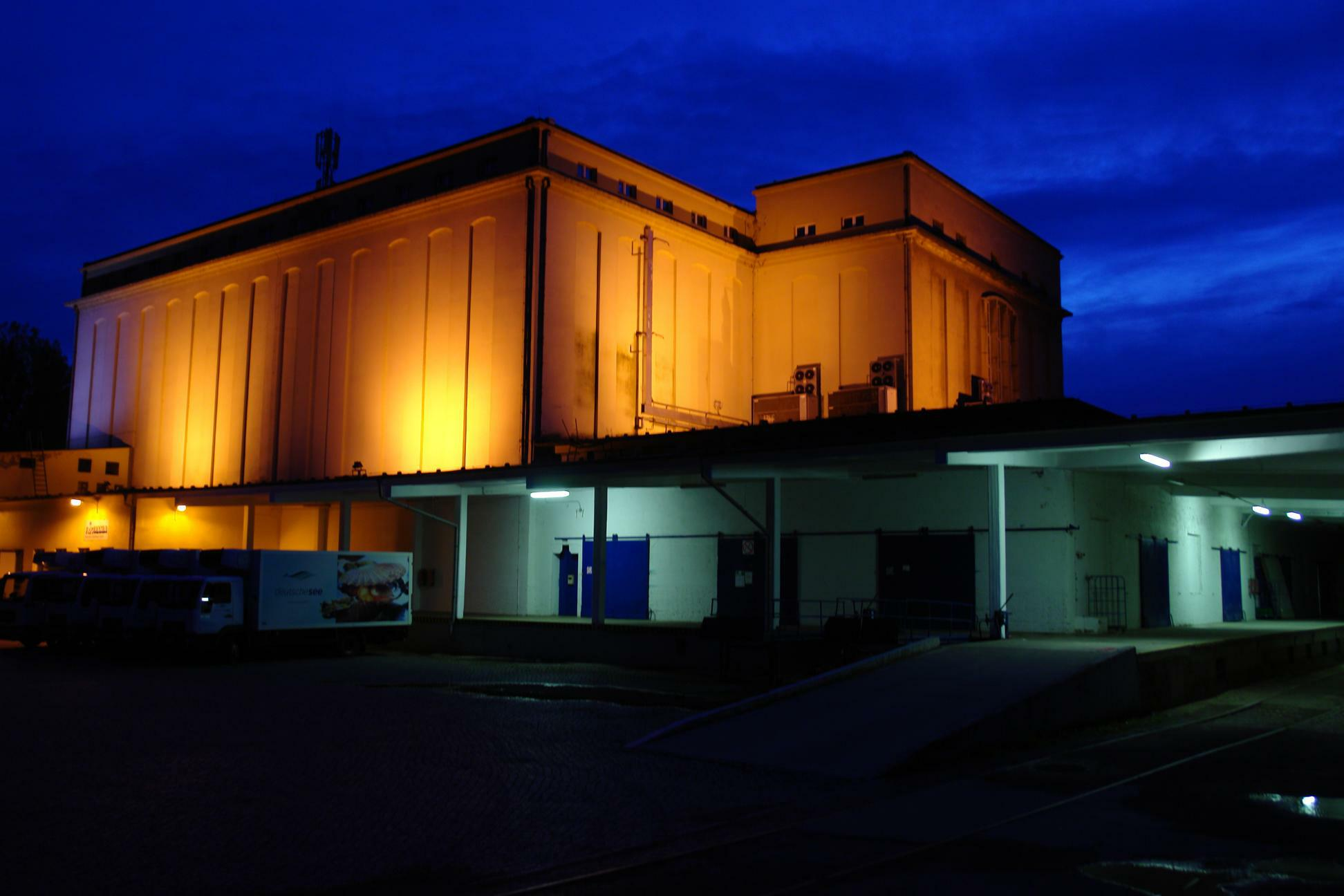 Kühlhaus im Ostragehege Dresden